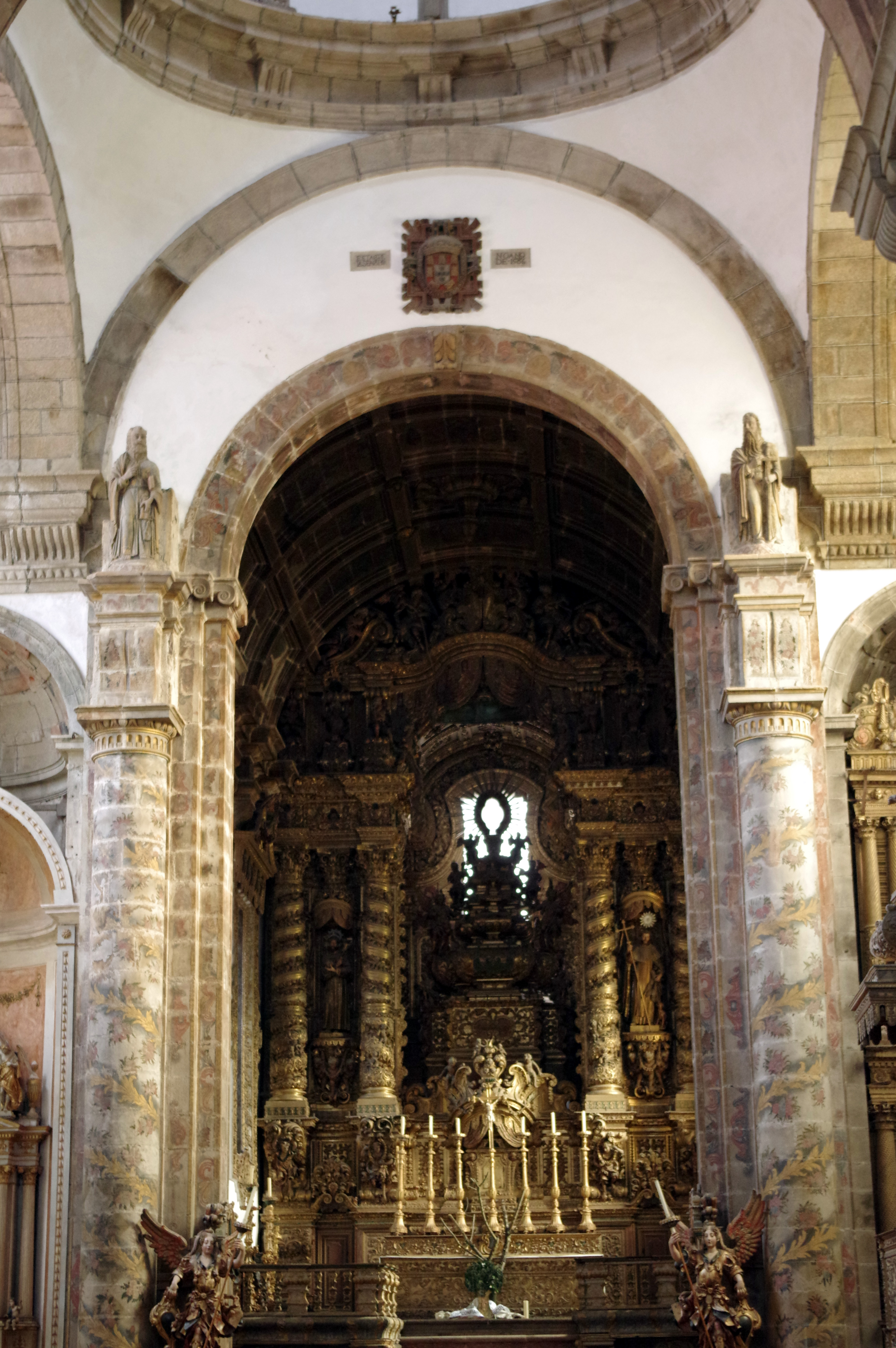 22.4.14 Amarante 13